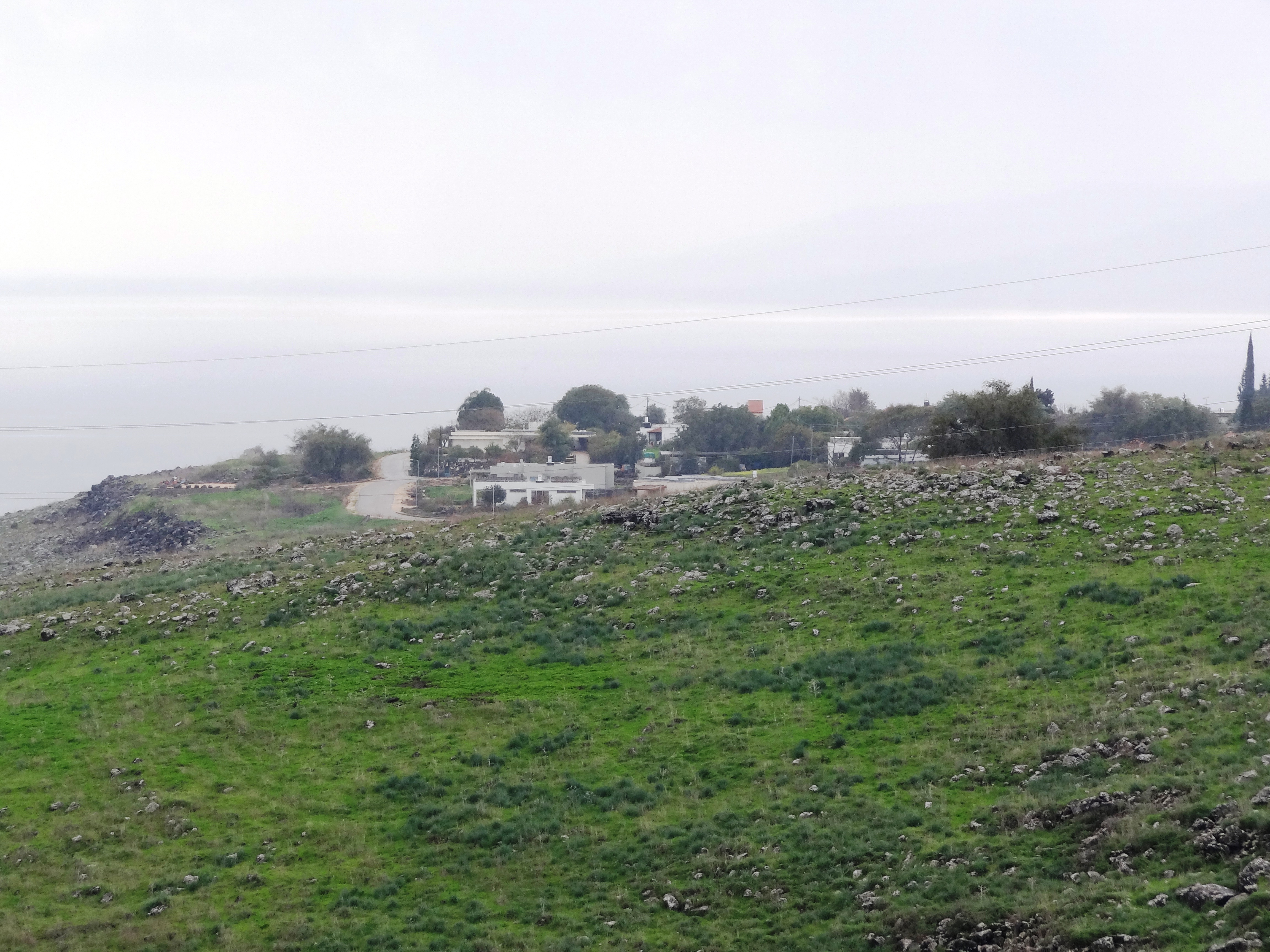 Almagor is a workers' moshav in the Upper Galilee in northern Israel. אלמגור הינו מושב במדרונות רמת כורזים מצפון לכנרת, בתחום המועצה האזורית עמק הירדן.